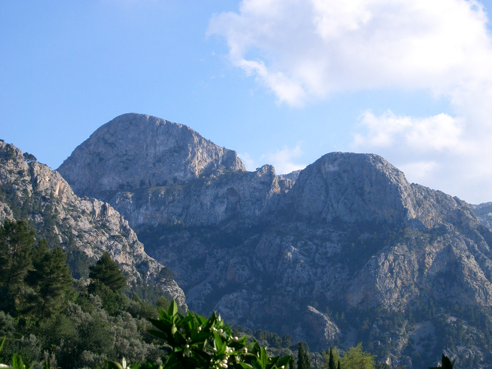 Els Cornadors, vists des de Fornalutx. Mallorca.